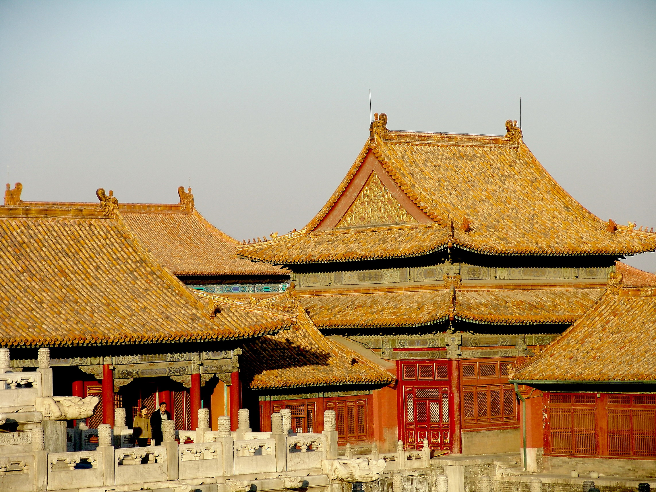 Forbidden City